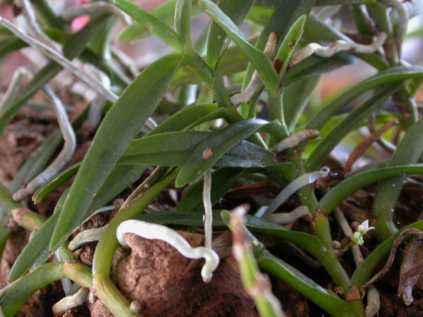 Campylocentrum densiflorum - Minas Gerais